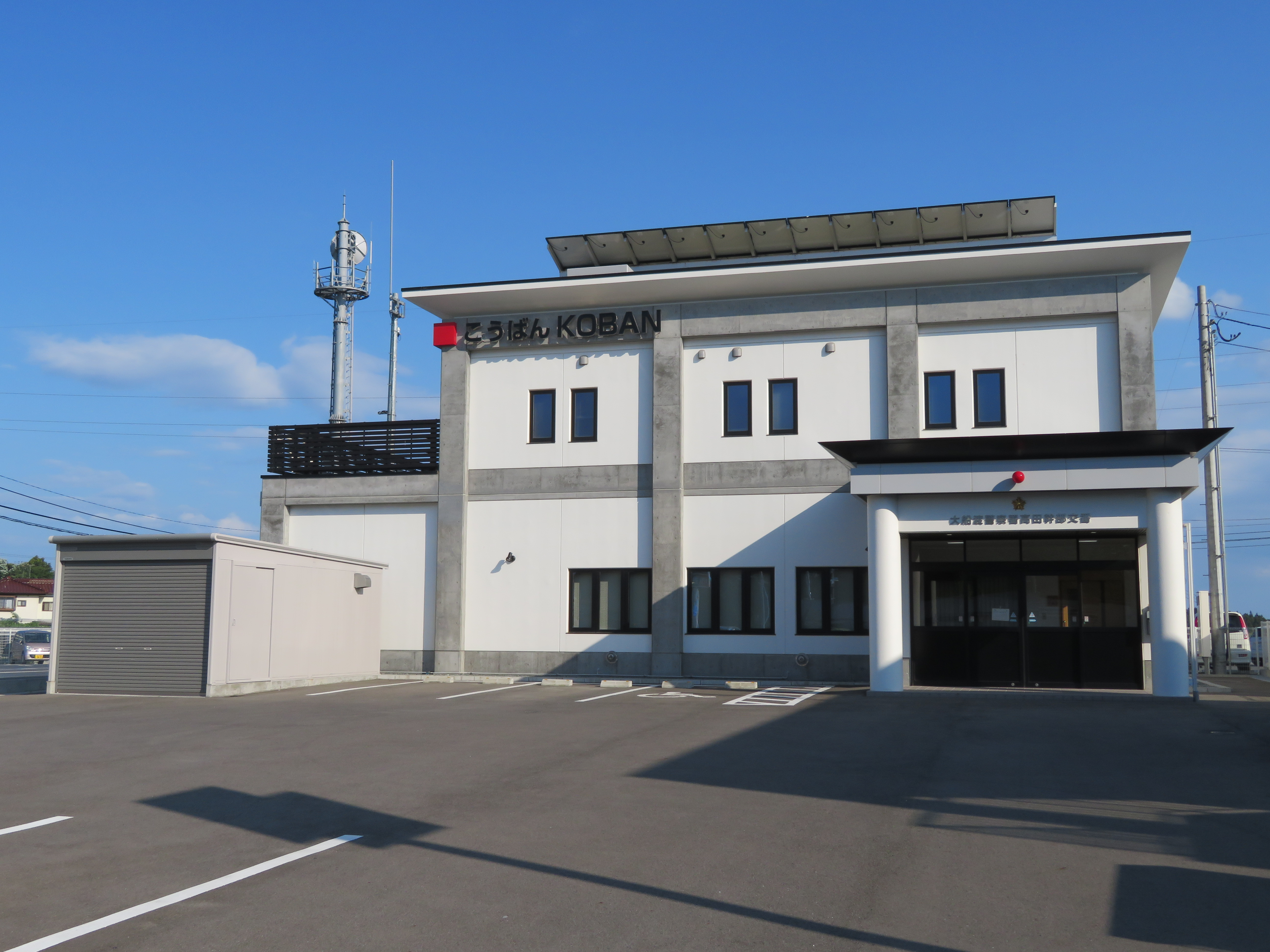 岩手県陸前高田市に所在する大船渡警察署高田幹部交番庁舎